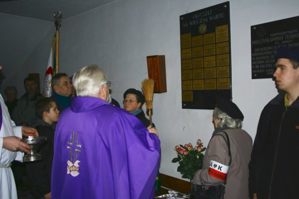 Uroczystość odsłonięcia tablic pamiątkowych poświęconych seniorom włocławskiego harcerstwa. Włocławek - kościół pw. Najświętszego Zbawiciela - 26 marca 2006 roku.